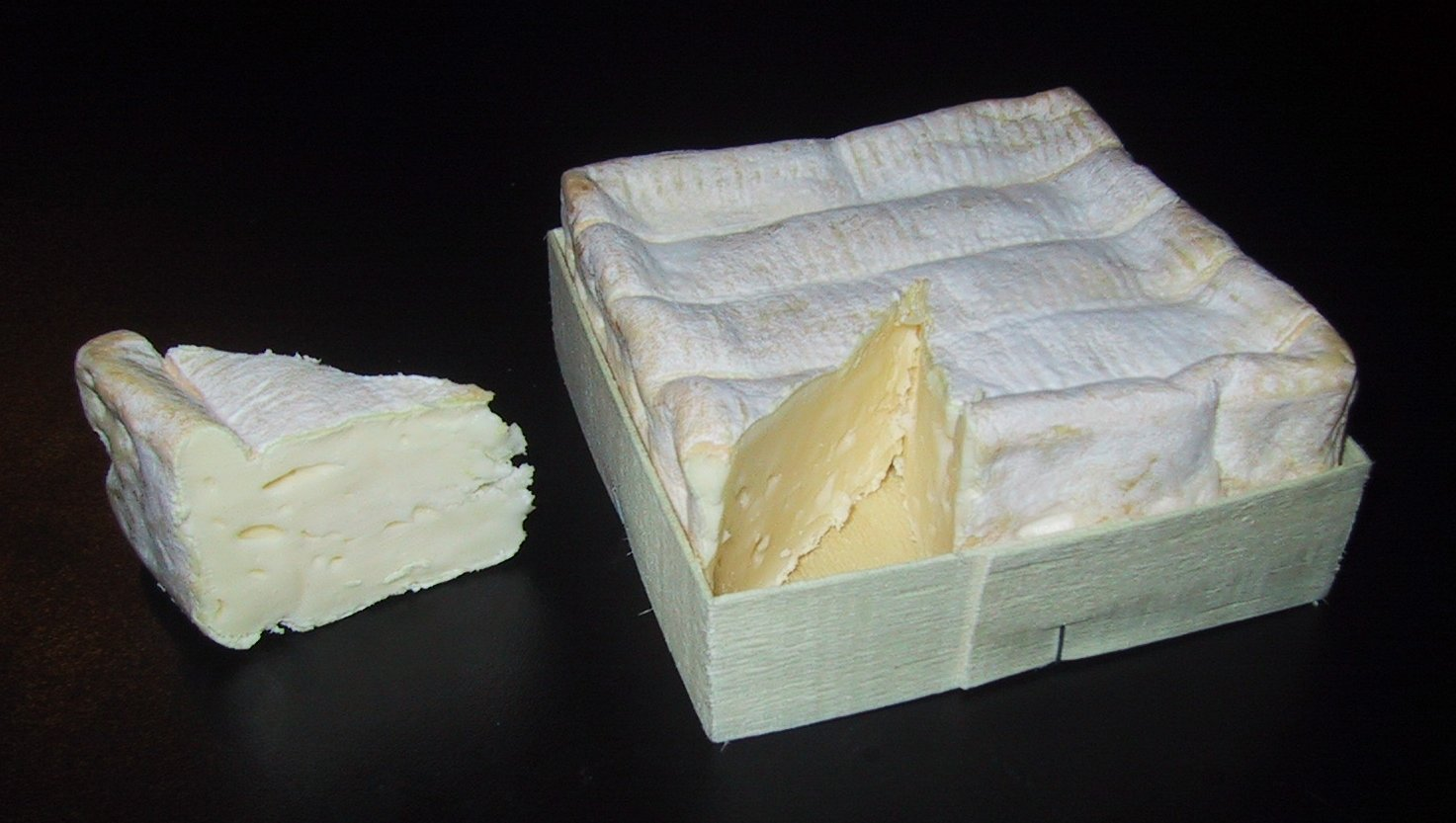 This picture is also displayed on other medias (details) Cette image apparaît aussi sur d'autres médias (détails) Petit pont-l'évêque (220g), France.